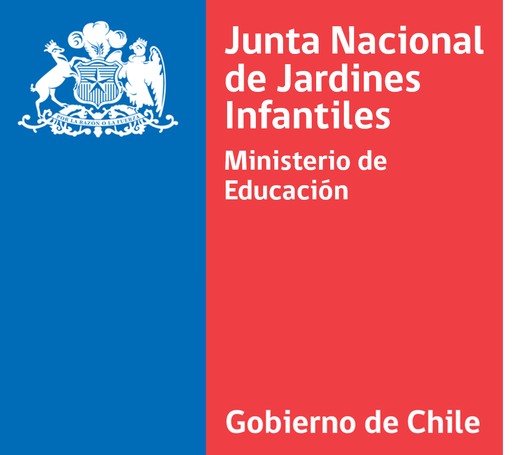 Logo de la junta Nacional de Jardines Infantiles del Ministerio de Educación.